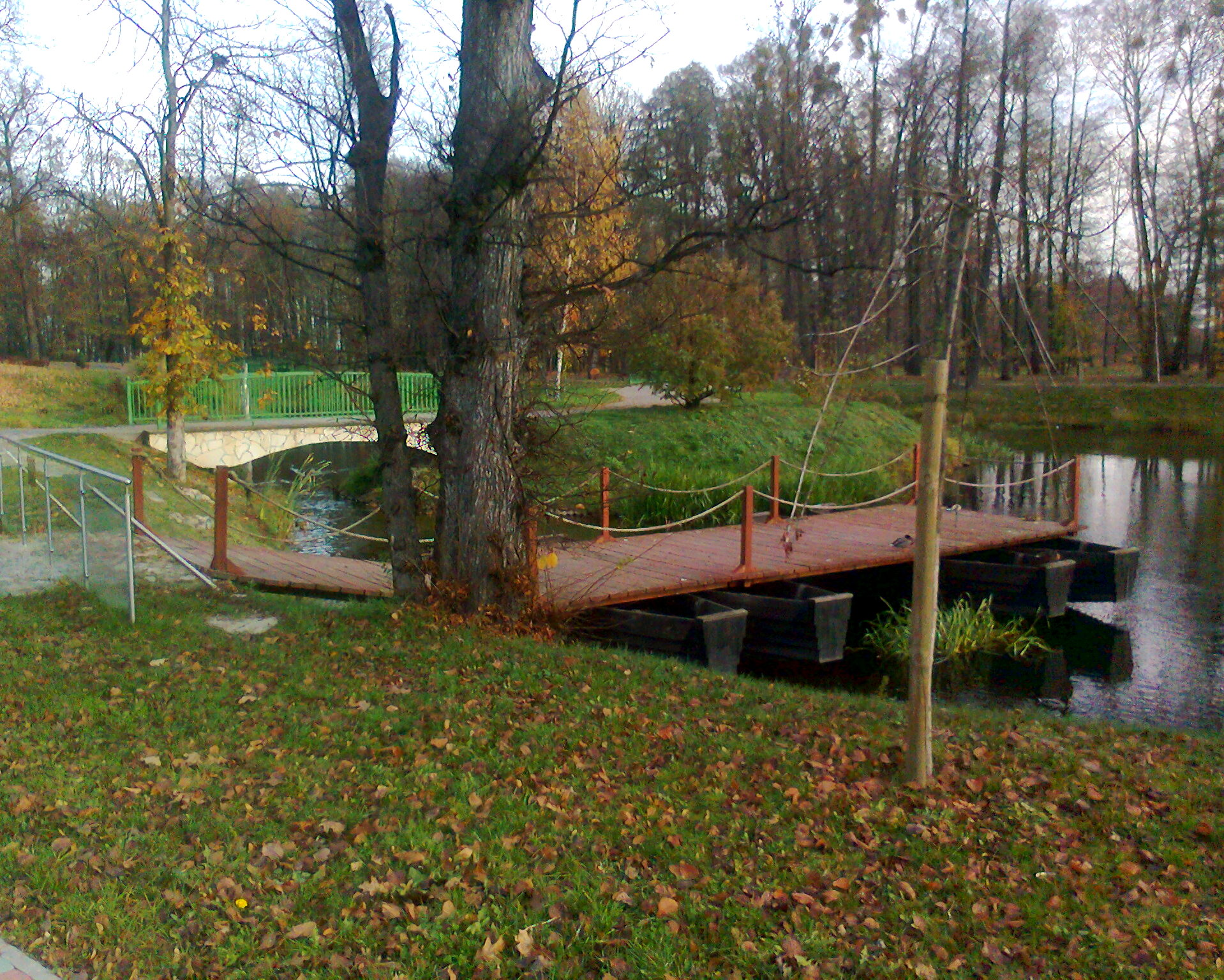 Kozienice, budowla przedstawia fragment przeprawy mostowej przez Wisłę w Czerwieńsku. Obszar specjalnej ochrony ptaków: Ostoja Kozienicka This is a photography of protected area with CRFOP ID PL.ZIPOP.1393.N2K.PLB140013.B